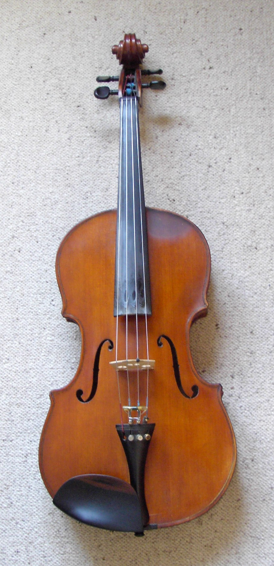 zelfgemaakte foto van een altviool